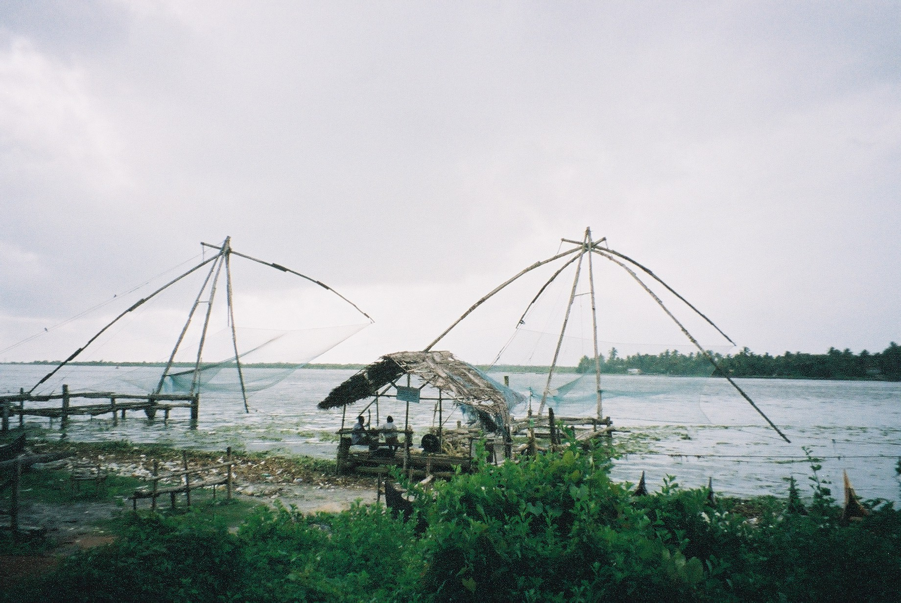 Filets chinois à Fort Cochin - auteur hélo